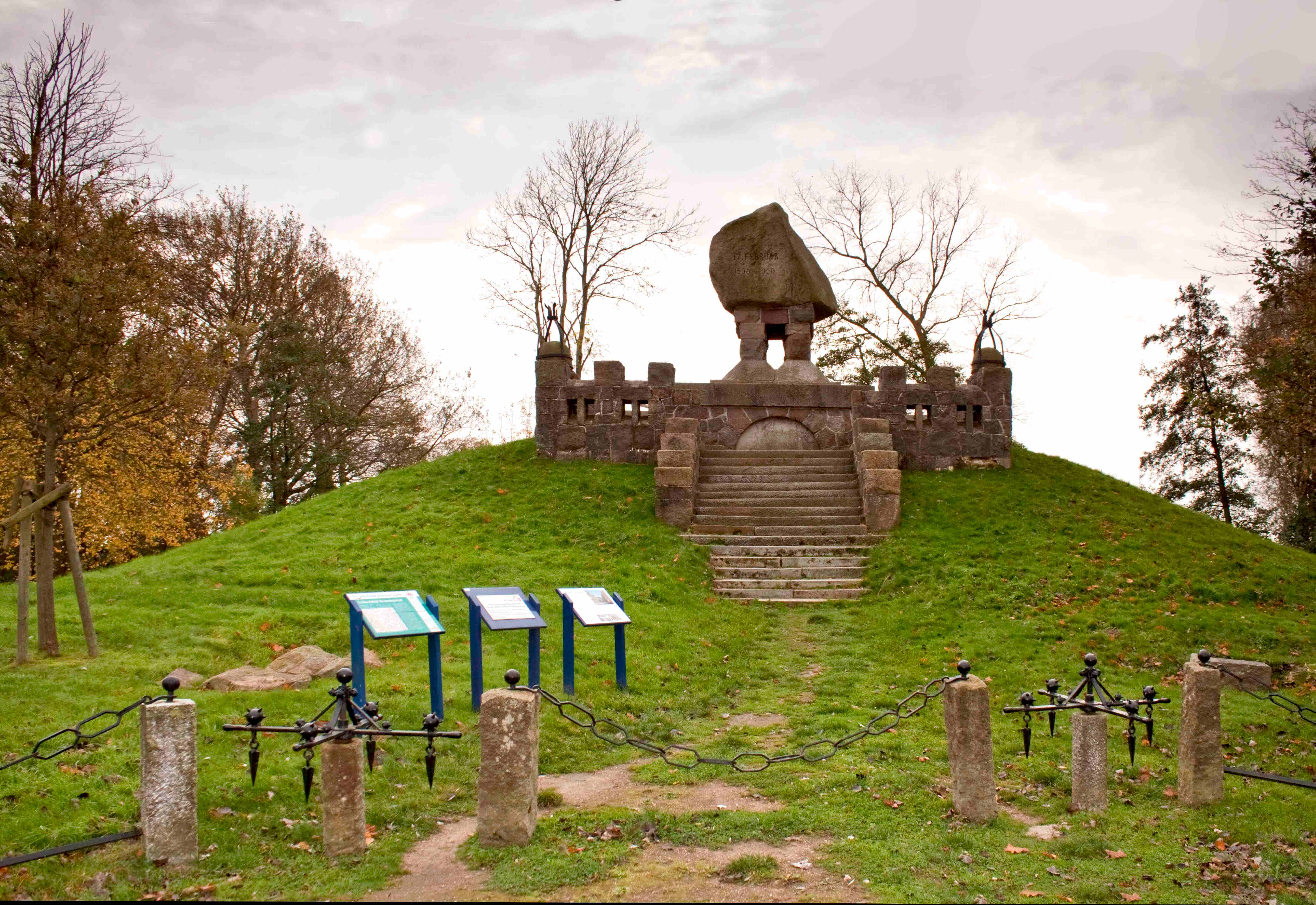 Denkmal Schlachtfeld Hemmingstedt in Dusenddüwelswarf